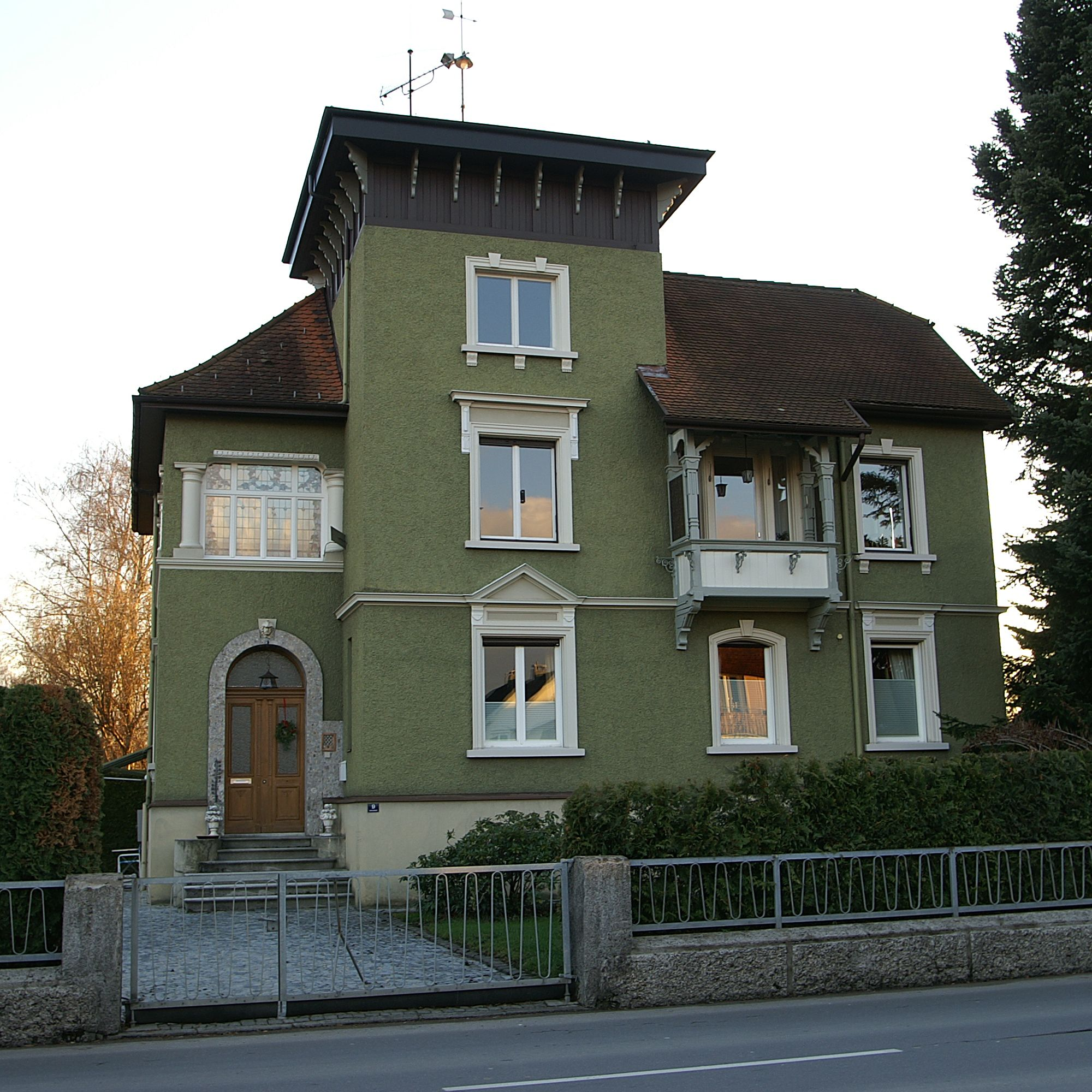 Lauteracherstrasse Nr.9, Wohnhaus mit klassizistischen Elementen sowie Jugendstilverglasungen in Fenstern. Villa des 1994 verstorbenen Schnapsbrenners Armin Schertler in Wolfurt, der den typischen Vorarlberger Schnaps Subirer bekannt machte.